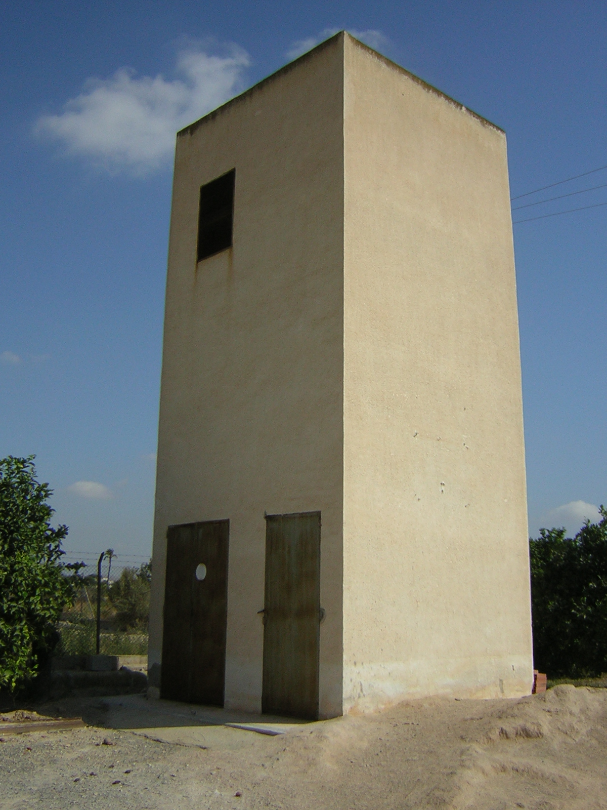 Centro de transformación en edificio